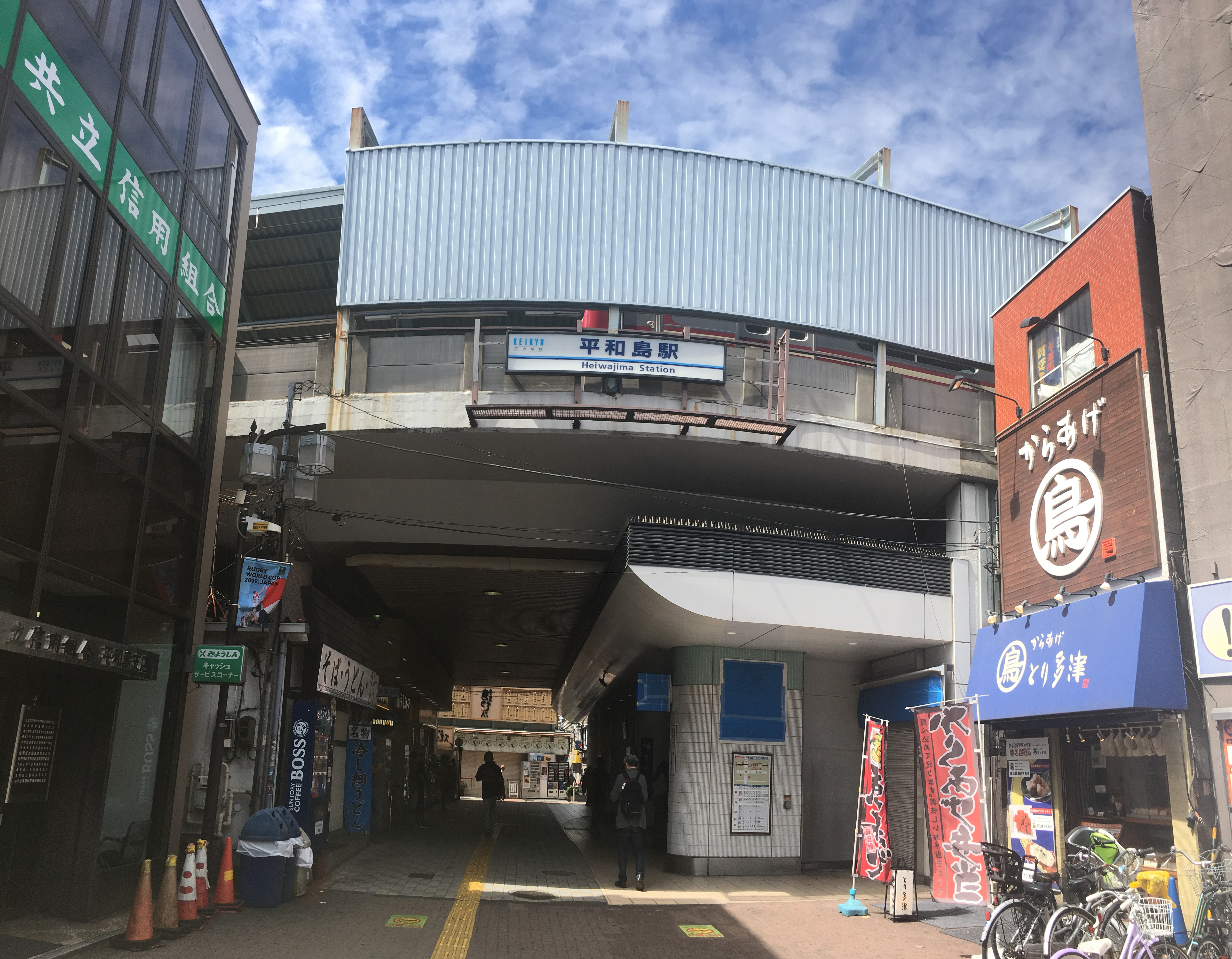 平和島駅 (Heiwa-Jima Stations)